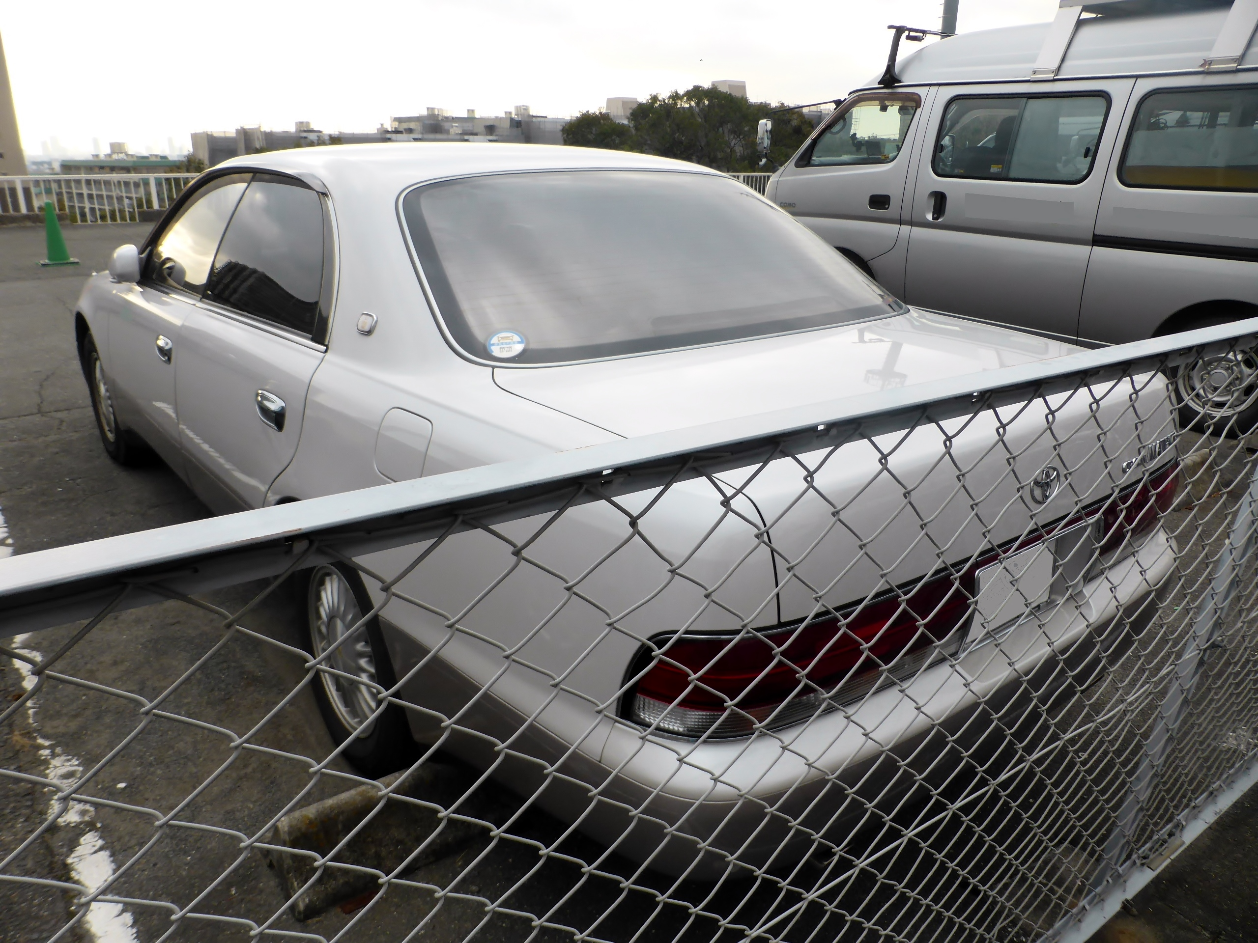 S140型トヨタ・クラウンマジェスタをリアから撮影。